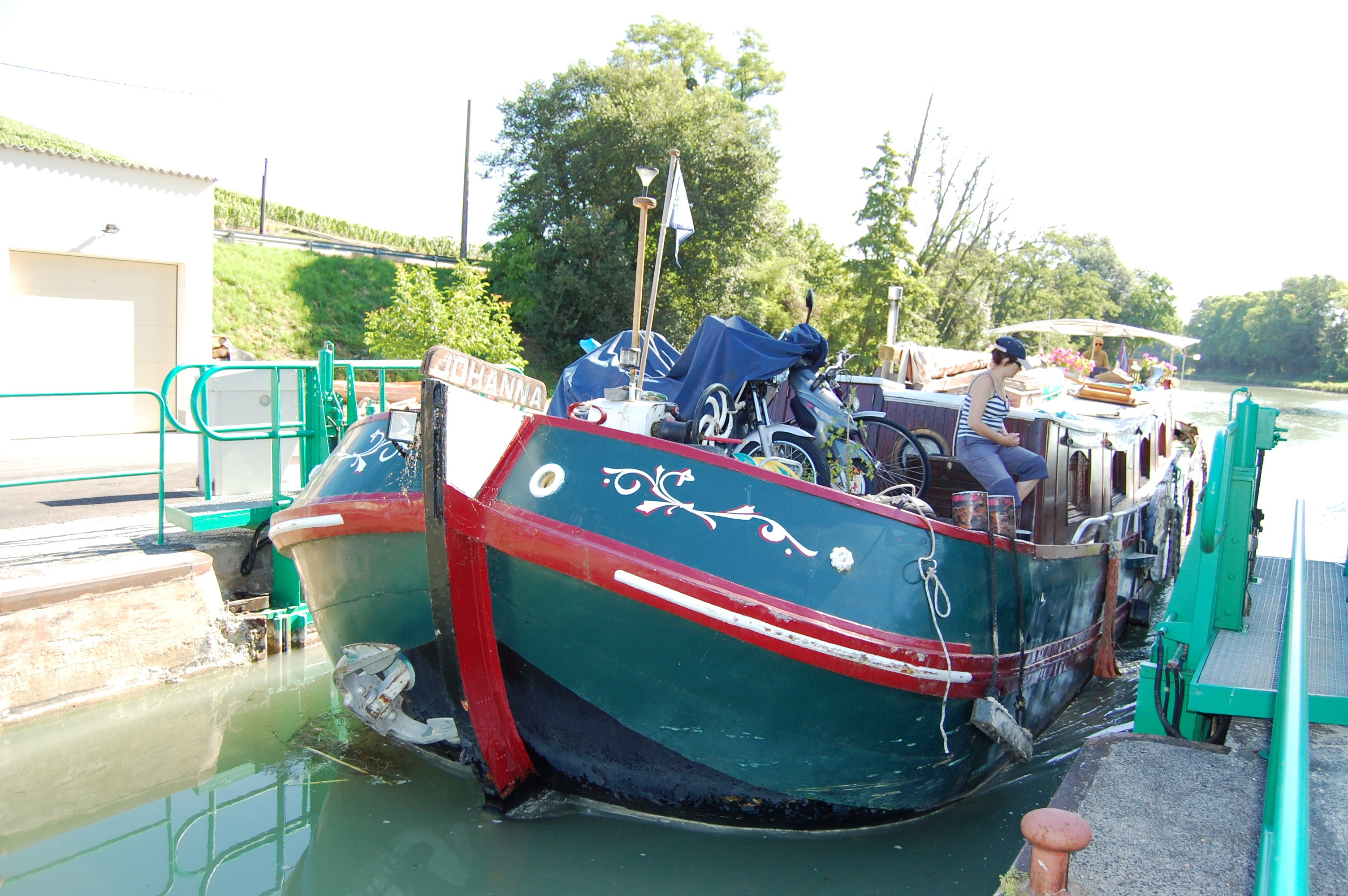 De tjalk Johanna in de sluis van Mareuil-sur-Ay in het Canal-lateraal-a-la-Marne.